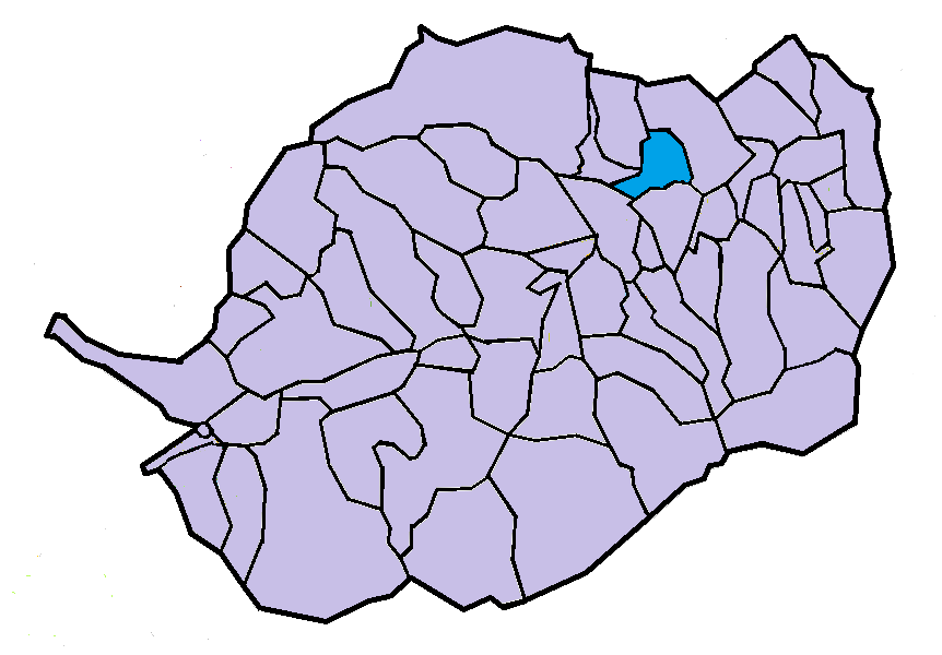 Catllà en el Conflent, a partir del mapa municipal del Conflent de lliure disposició adaptat al Nomenclàtor toponímic aprovat el 2007